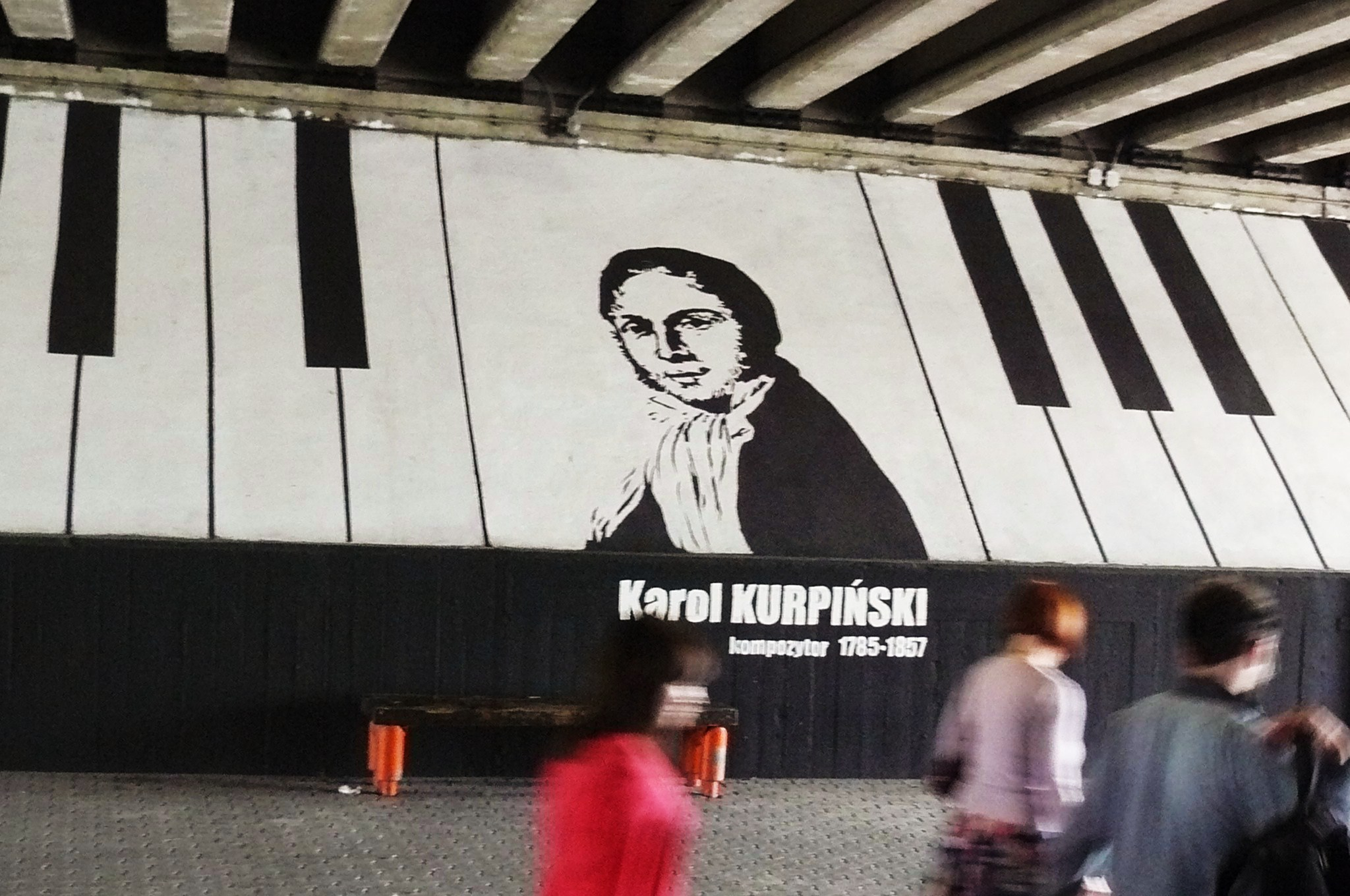 PST Poznań - stacja Kurpińskiego.